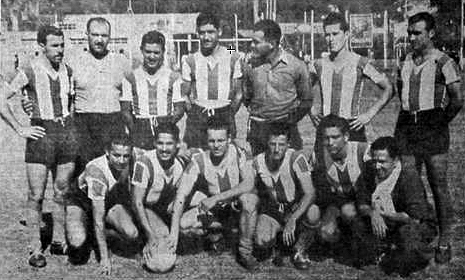 Equipo de Unión de Santa Fe que formo en 1947